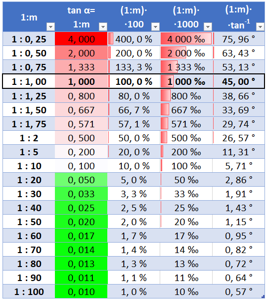 Formatēta nogāzes slīpumu stāvuma tabula dažādās mērvienībās (versija 2)